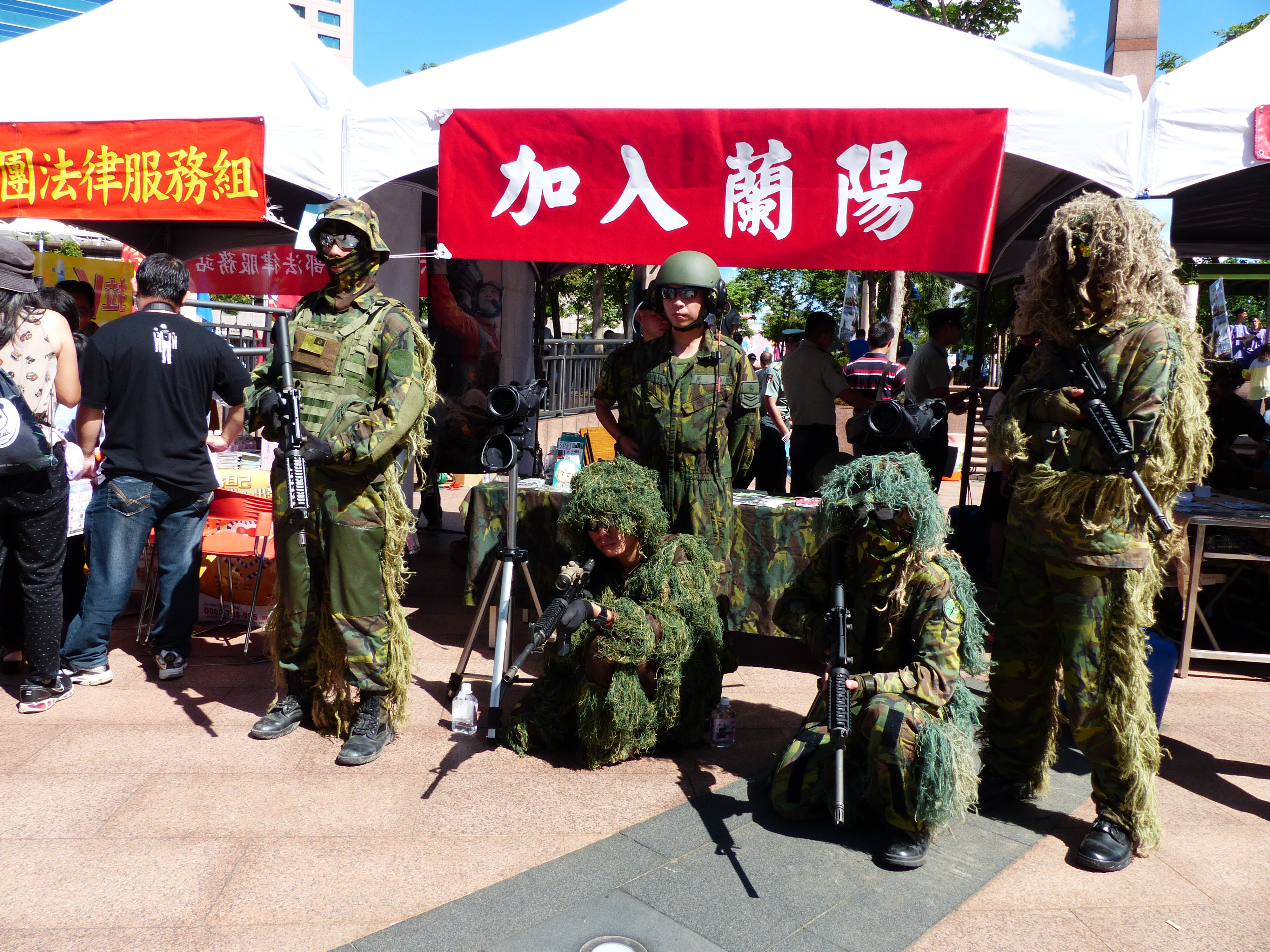 國軍人才招募新北市宣導活動，陸軍蘭陽地區指揮部人才募集攤位前全副武裝的陸軍特戰小組。